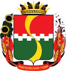 Герб_Амвросіївського_району